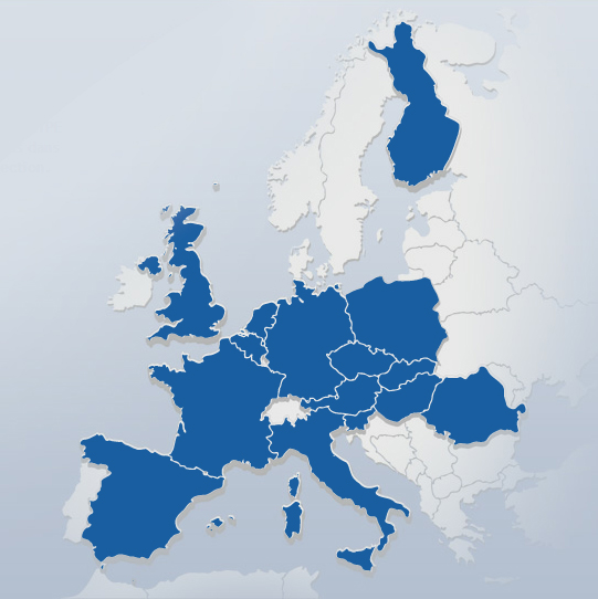 Pays européens couverts par le projet ROSYPE.